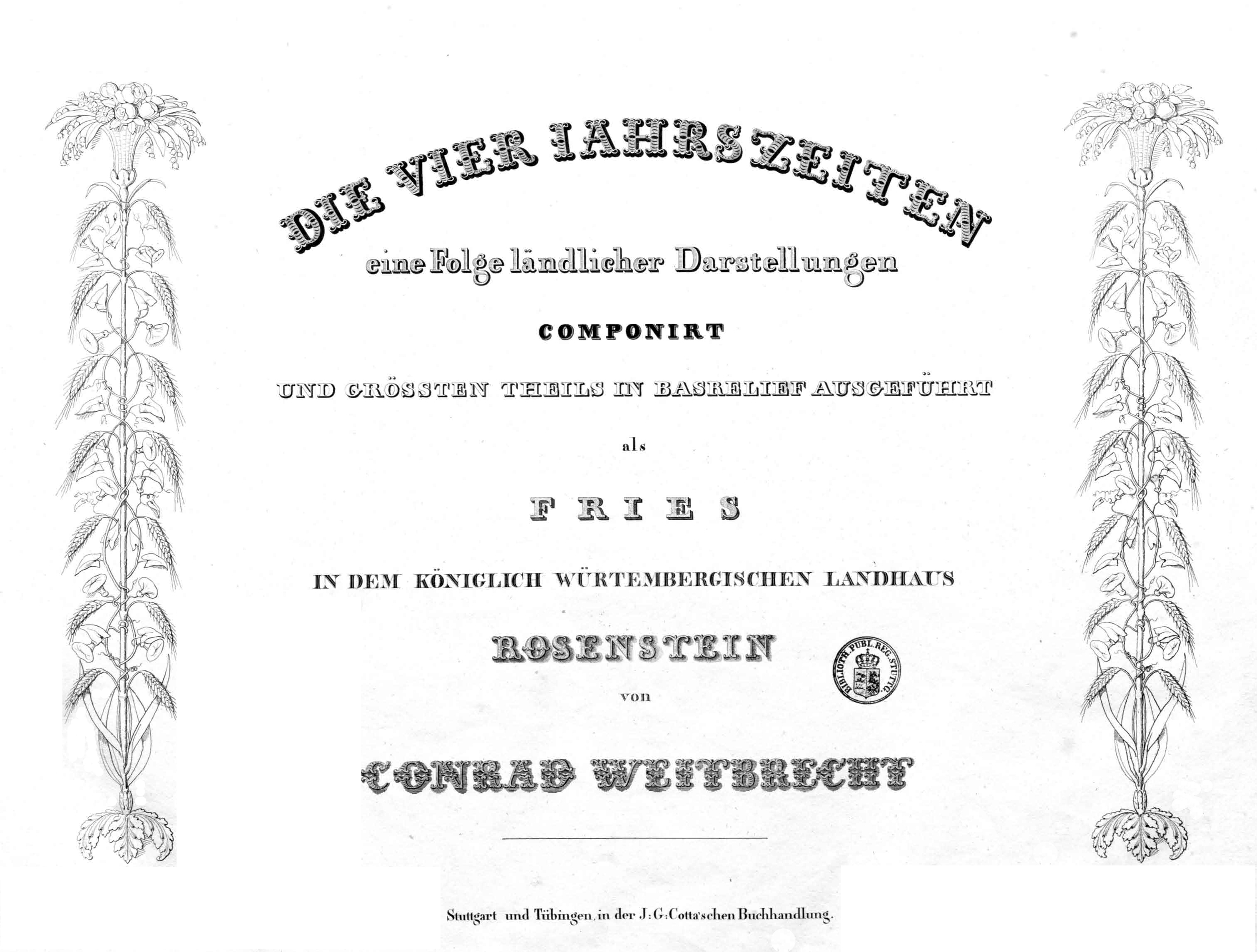 Titelblatt der Buchausgabe in Breitfolio von Conrad Weitbrechts graphischem Zyklus „Die vier Jahreszeiten“.